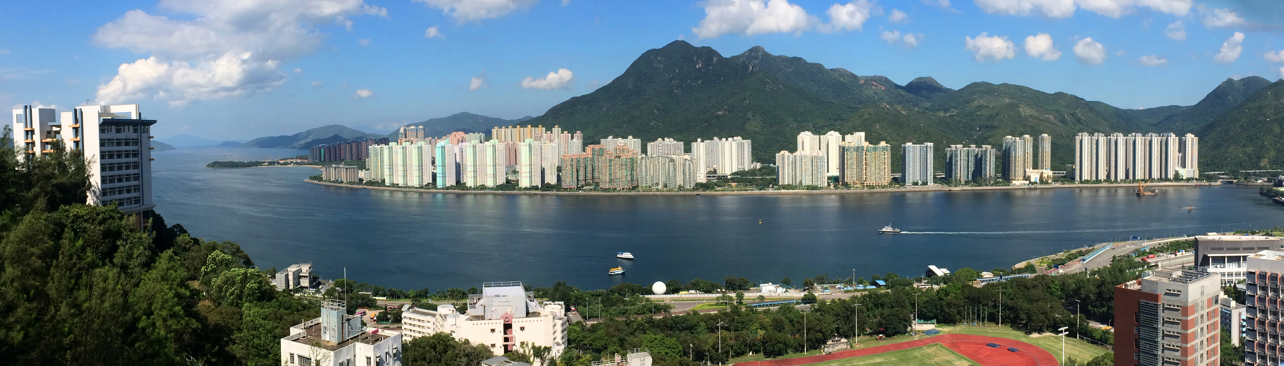 Ma On Shan